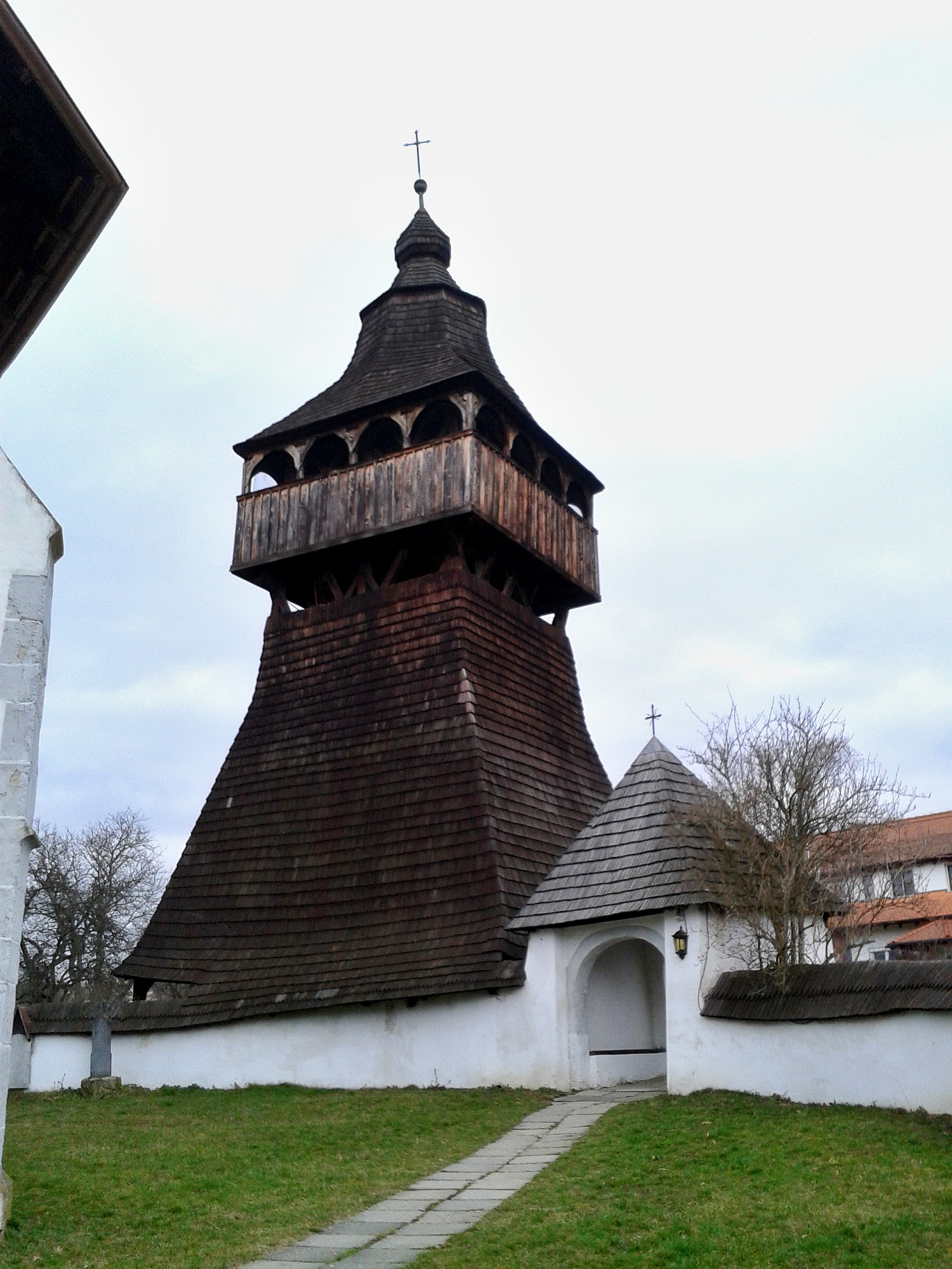 drevená renesančná zvonica